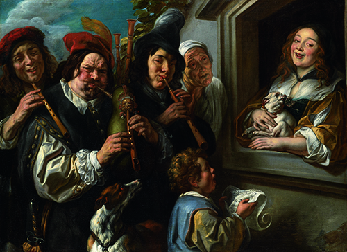 Jacob Jordaens, De serenade / Ambulante muzikanten brengen een serenade voor een jonge vrouw in een open raam, 1640-1645, olieverf op doek, 115 x 157,5 cm.